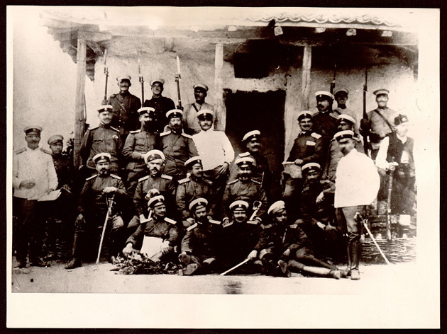 Пост № 1 Гердеме в Сакар. 8 юни 1912. Седнали: ген. Радой Сираков, началник на 9 дивизия, ген. Павел Христов, началник на 5 дивизия, ген. Радко Димитриев, началник на ІІІ инспекционна област, ген. Климент Бояджиев, началник на 4 дивизия. От правите пред войниците, вторият отляво надясно с брадата е майор Коста Николов, старши адютант на 5 дивизия. От седналите долу, крайният в ляво с карта е майор Коста Николов, старши адютант на ІІІ армия. Правият вкрая вдясно полковник Константин Жостов